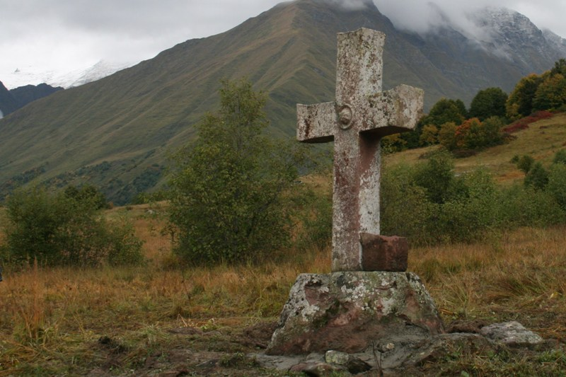 morah cross